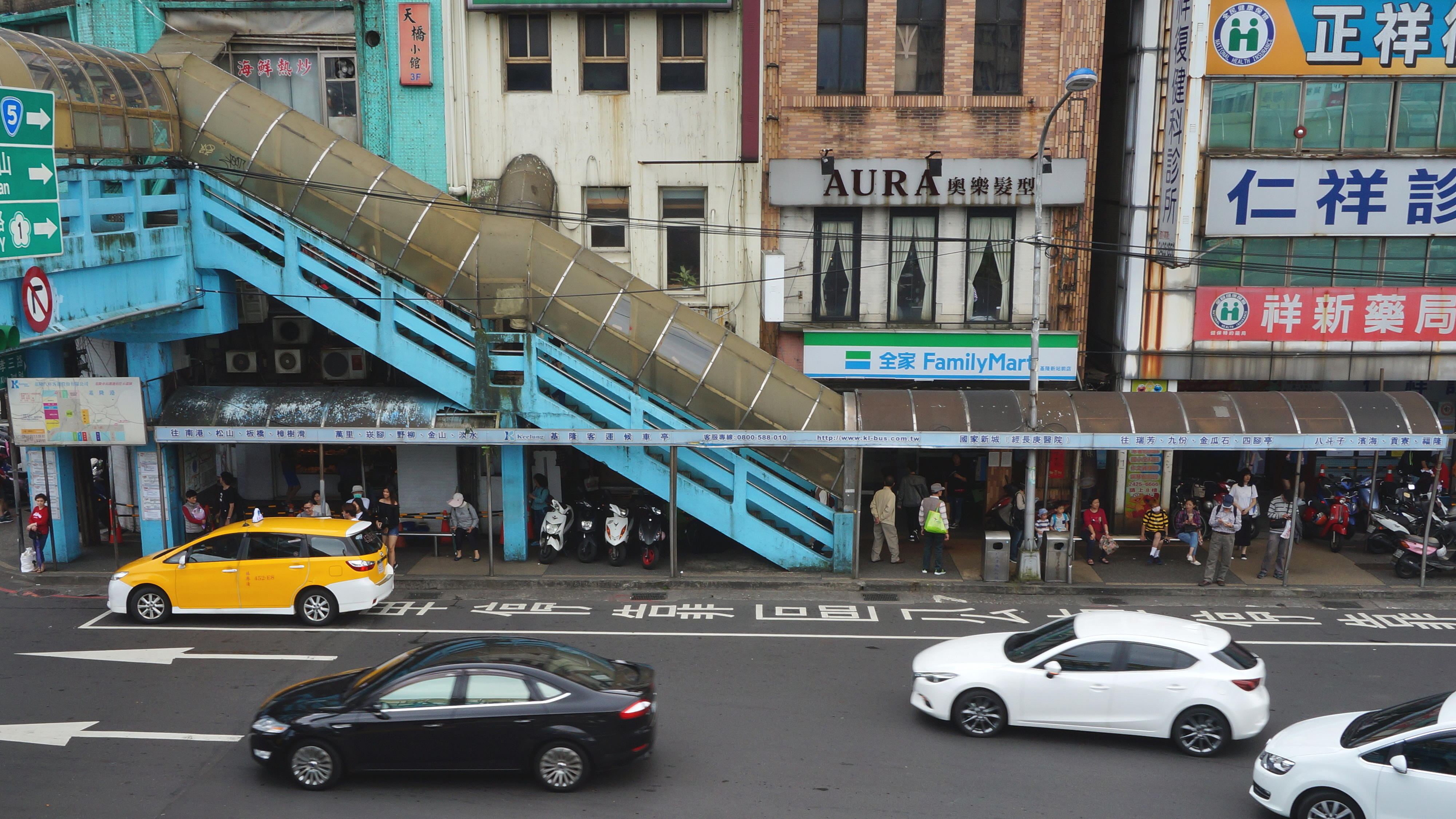 基隆客運忠一路候車亭，全家便利商店基隆新站前店位於後方。